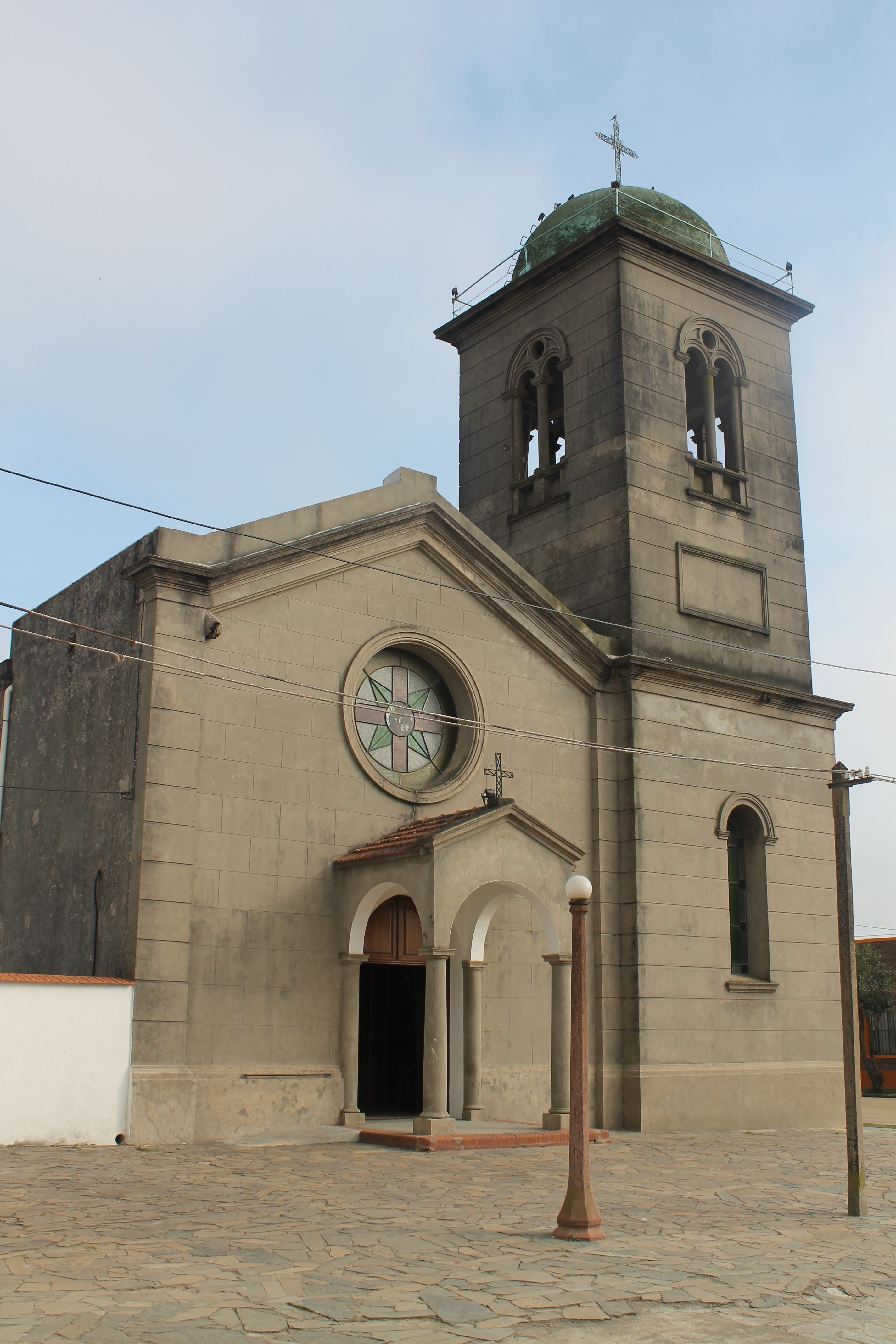 Parroquia de San Ramón. Ubicada en el departamento de Canelones